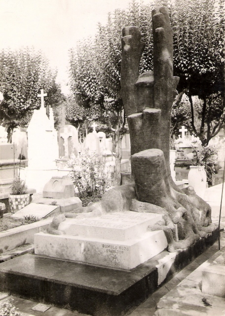 Panteón frances de La Piedad . "Imploración". 1er termino, escultura Rómulo Rozo 1926. Foto User:Comvaser